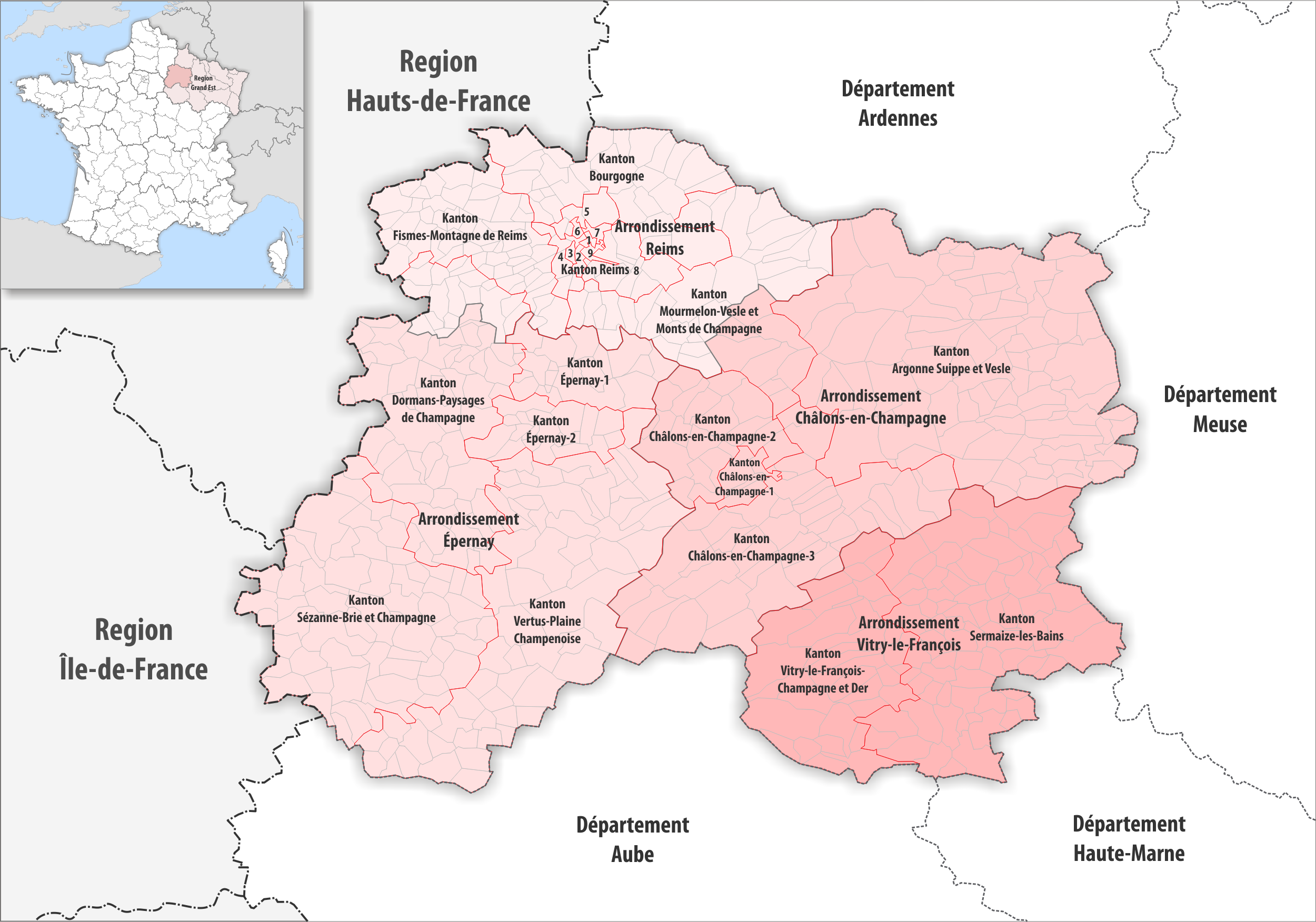 Gemeinden, Kantone und Arrondissemente im Departement Marne